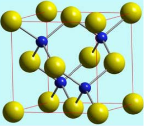 Zinkaren blendaren egitura